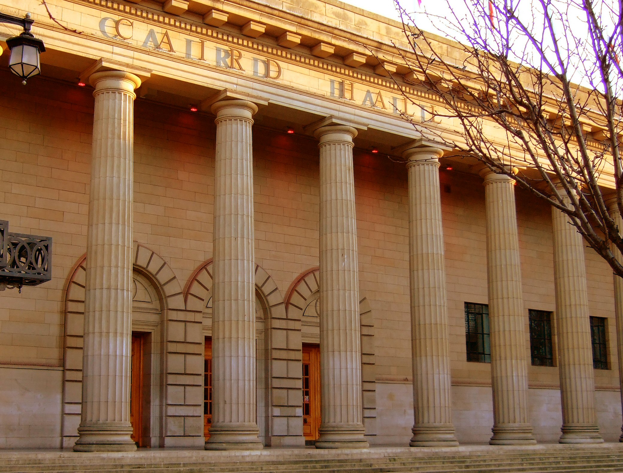 Dundee Caird Hall